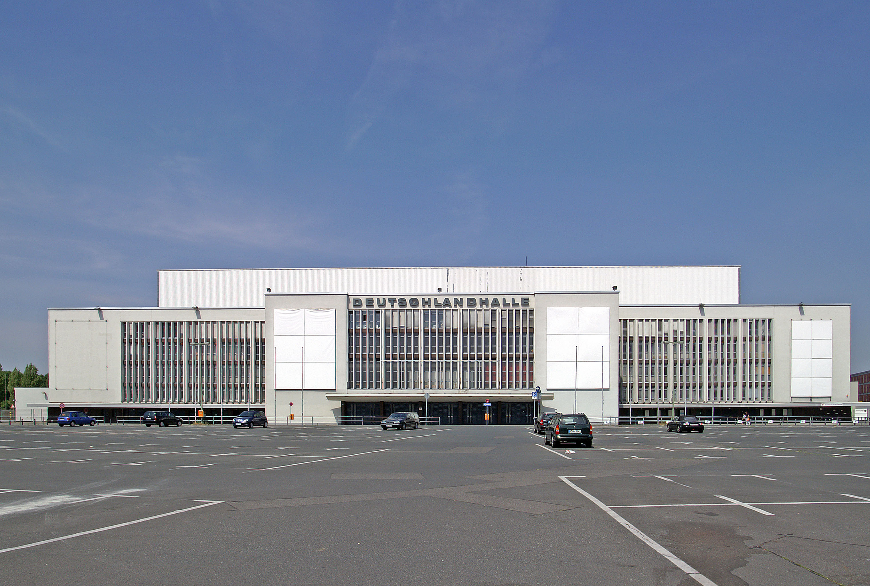 Deutschlandhalle, Berlin